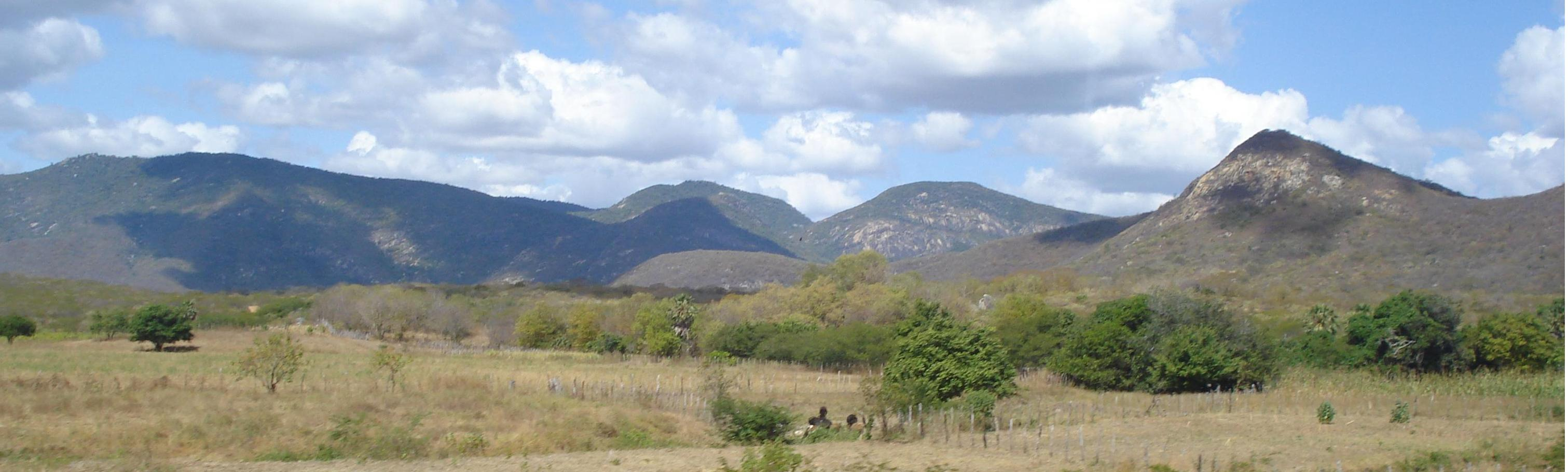 Vista parcial da serra azul, Ibaretama, ceará.